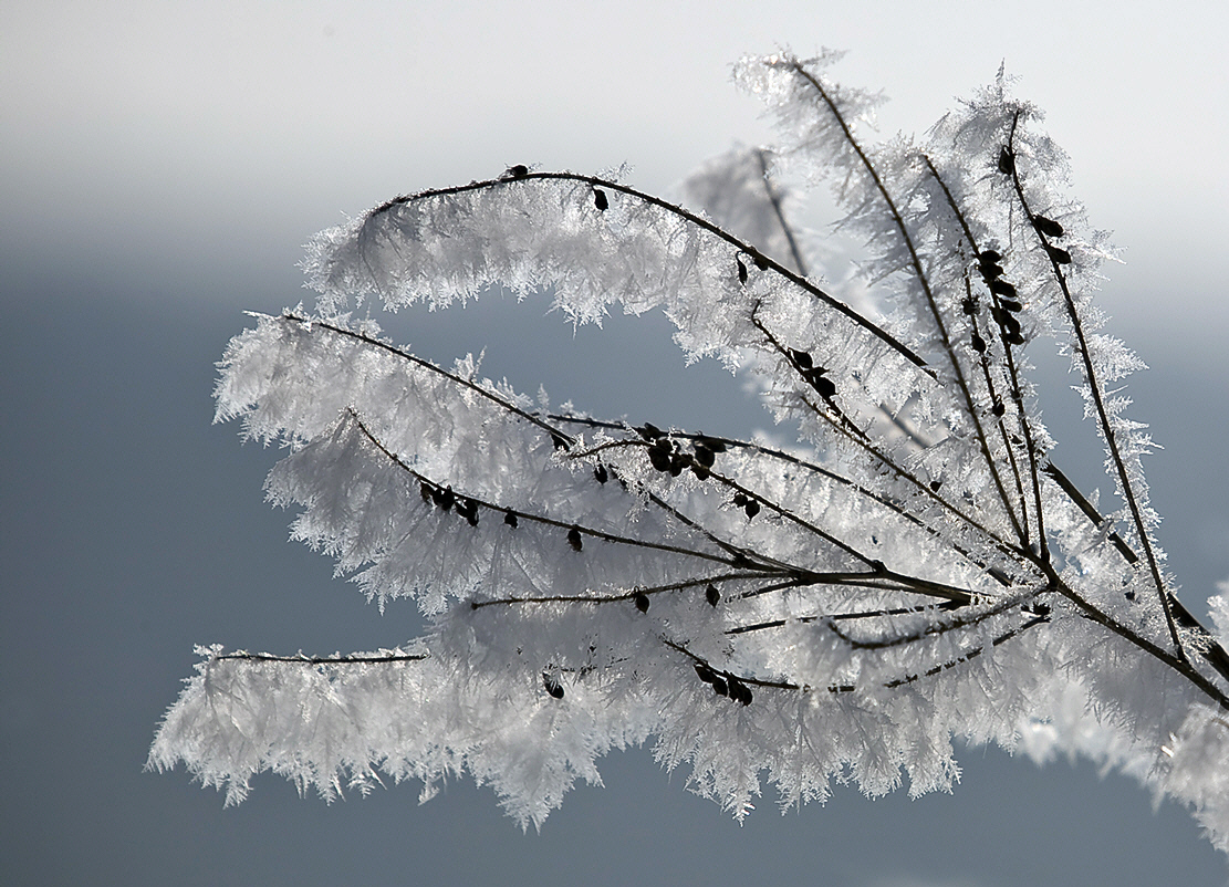 Schneekristallwachstum